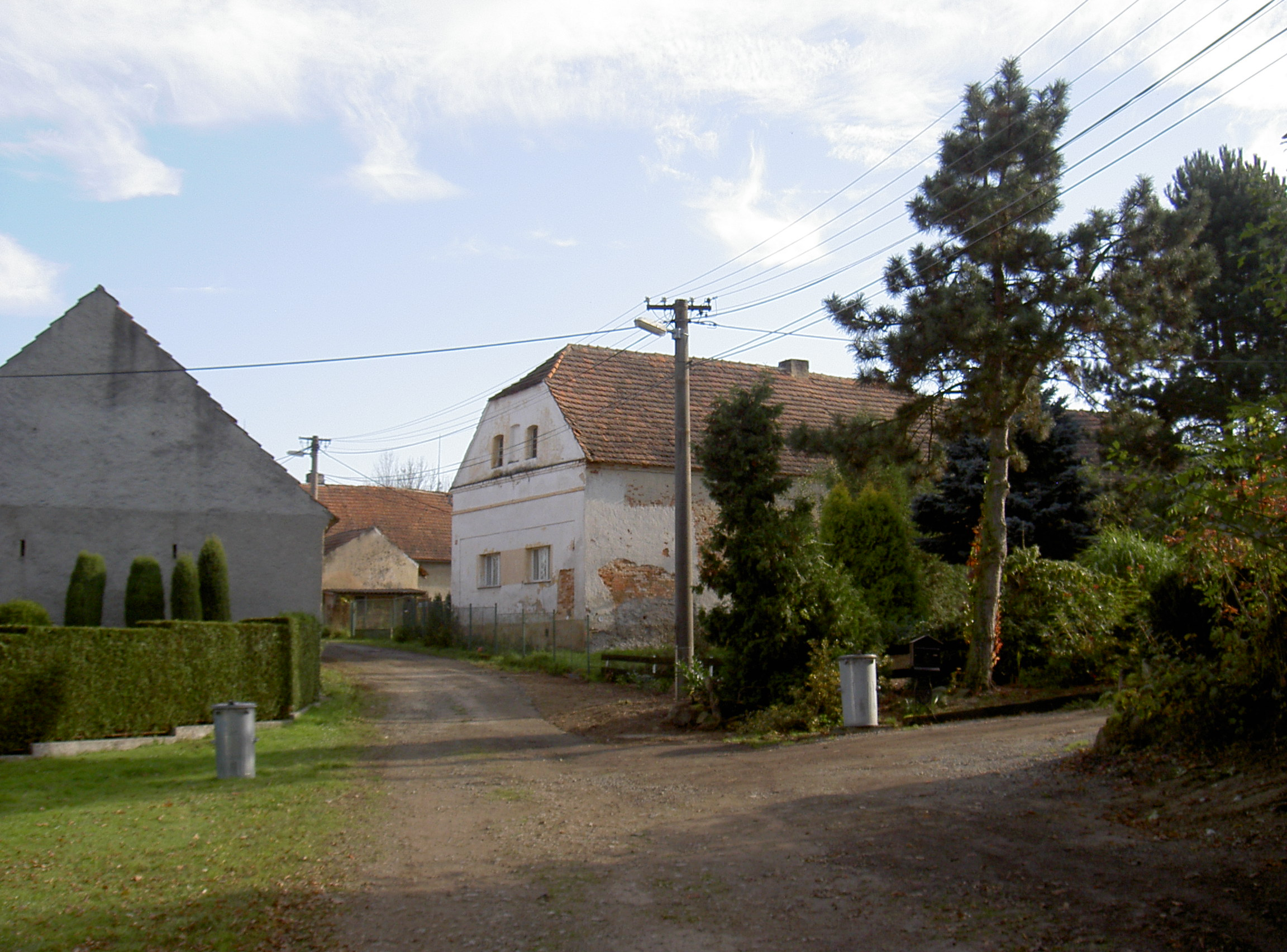 Ždánov (okres Domažlice)